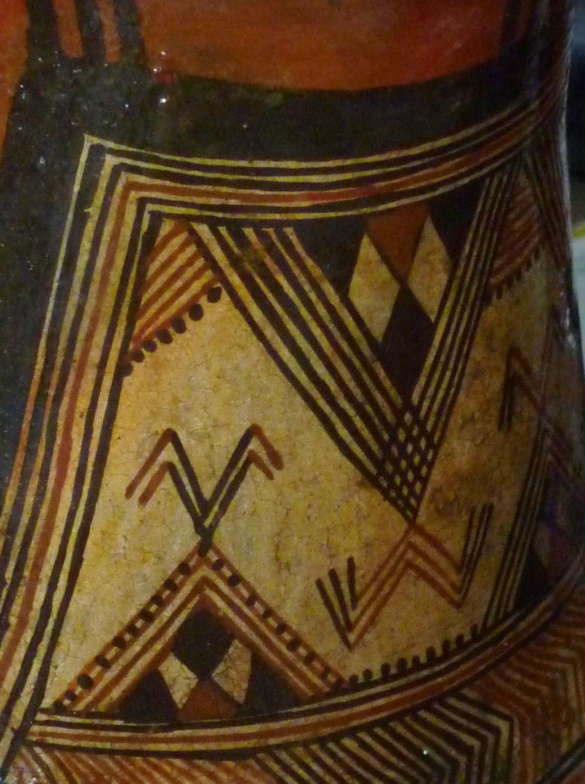 Poterie de Kabylie (détail), Algérie